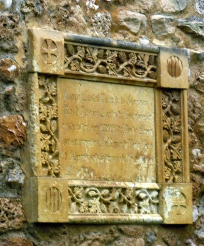 Placa en recuerdo de la restauración del castillo palacio de Jaume I (s.X), efectuada por Ramón de Viala y de Ayguavives, Barón de Almenar en Piera (comarca de l'Anoia, Barcelona).